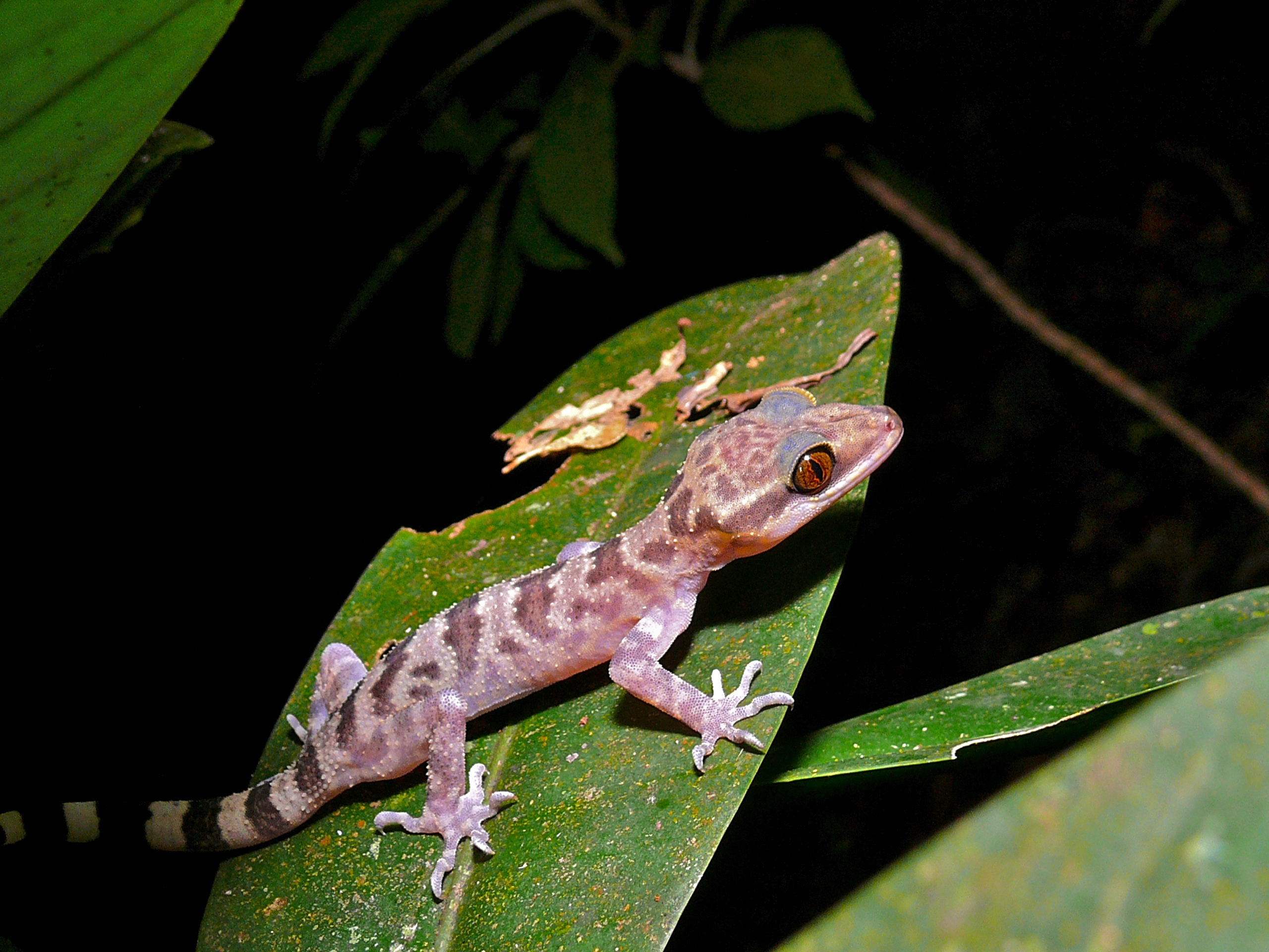 Mount Kinabalu NP, Sabah, MALAYSIA